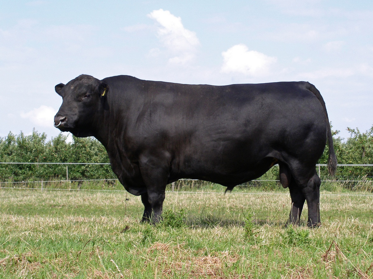 Das Bild zeigt den Herdbuchbullen „Tommy“ der Rasse Deutsch Angus.